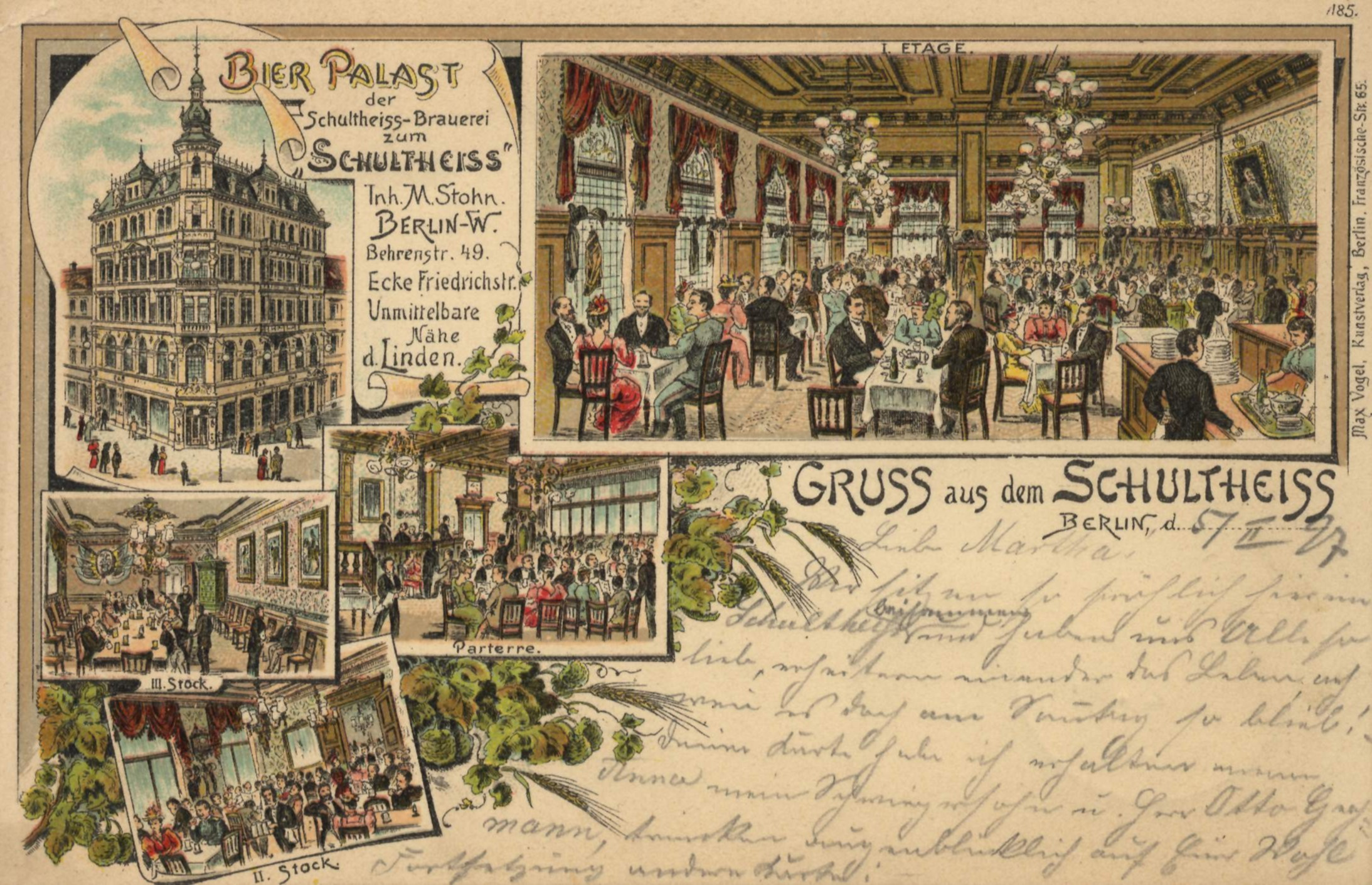 Bierpalast der Schultheiss-Brauerei in der Behrenstr. 49